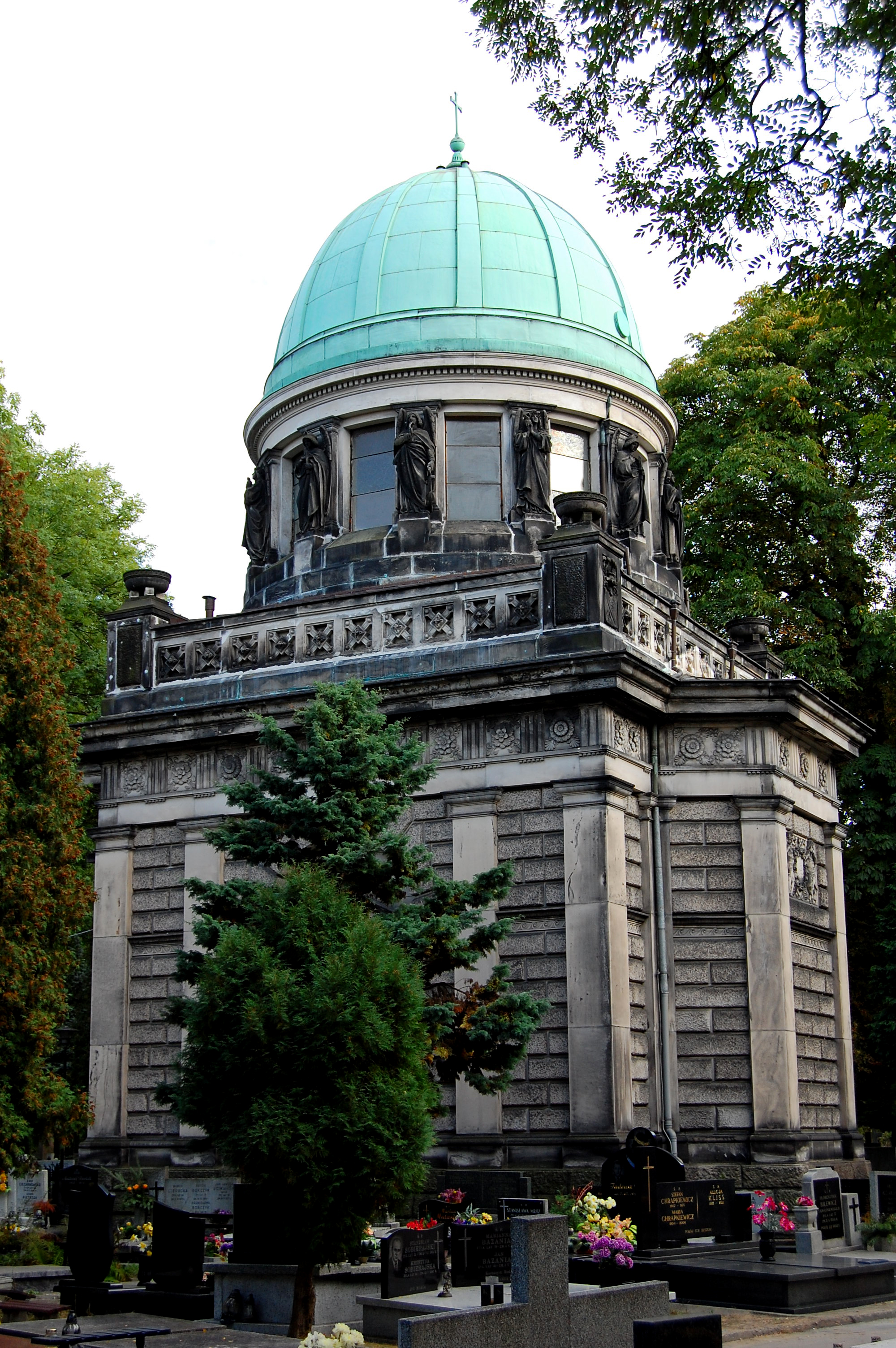 Łódź, ul. Ogrodowa 39